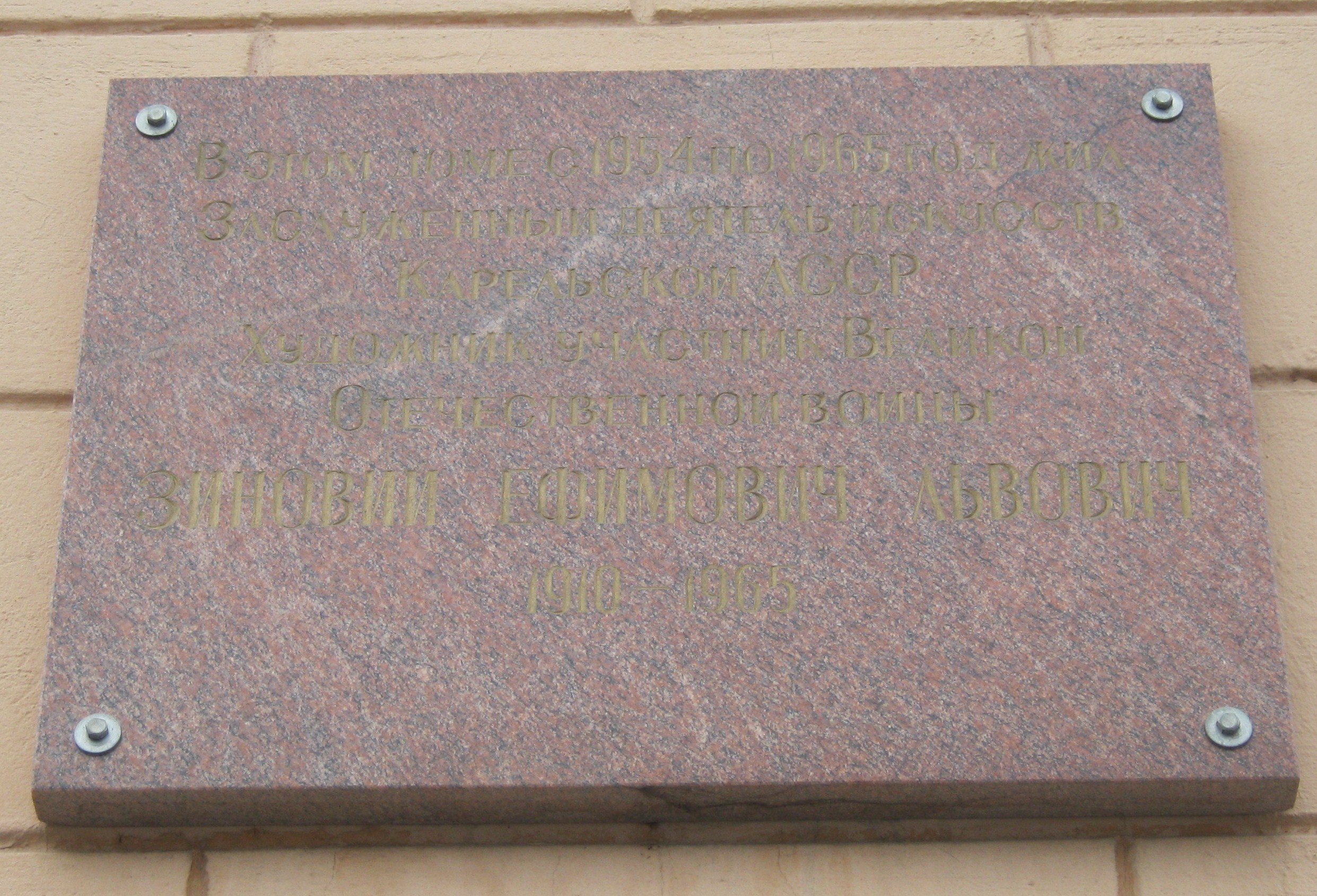 Мемориальная доска в Петрозаводске